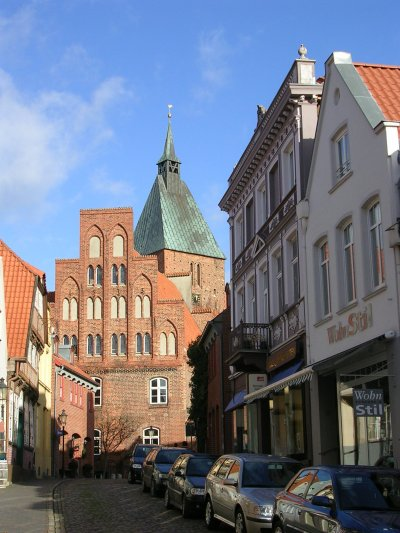 Marktstr. in Mölln(Lbg.) Selbst fotografiert und frei unter der GNU-FDL